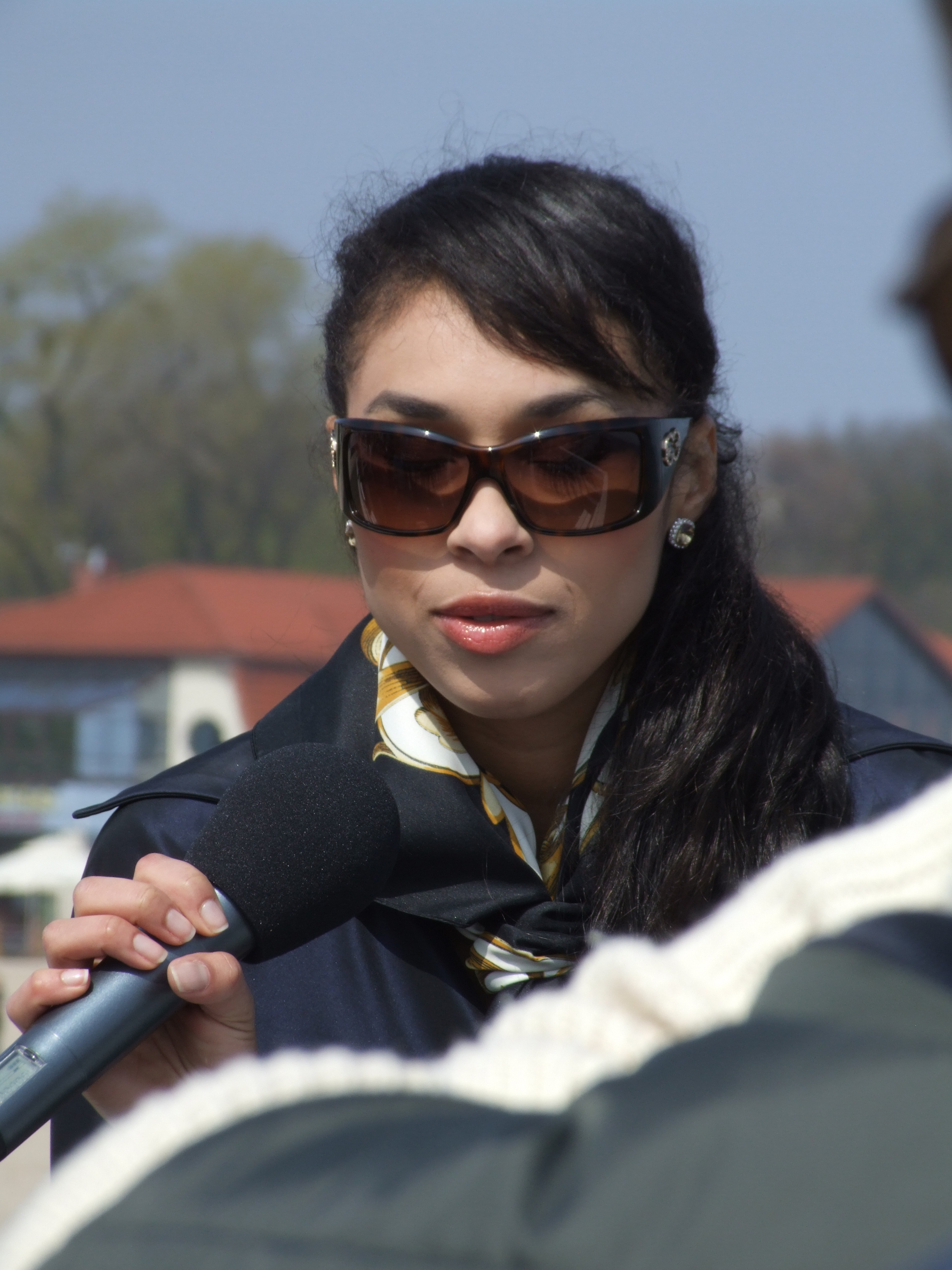 = Summary == Description